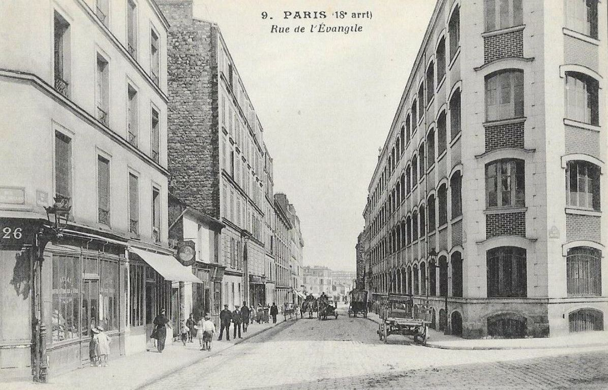 Paris.Rue de l'Evangile.Rue Marc-Séguin